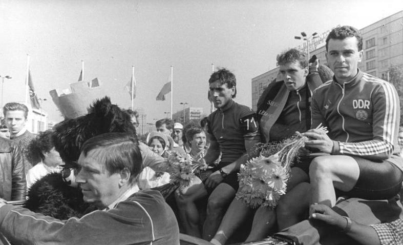 Abdushaparow, Olaf Ludwig, Uwe Raab ADN-ZB Kasper 9.5.87 Berlin: 40. Internationale Friedensfahrt - 1. Etappe: Rund in Berlin über 108 km-Ehrenrunde in einem Oldtimer auf der Karl-Marx-Allee für die Erstplazierten. Durch Olaf Ludwig (M.), Gesamtsieger der Fahrt des Vorjahres, und Exweltmeister Uwe Raab (r.) gab es einen Doppelerfolg für die Mannschaft der DDR. Für den Geraer war es der 29. Tageserfolg auf den Straßen des Friedens. Dritter wurde der sowjetische Friedensfahrt-Neuling Dahamolidin Abdushaparow (l.).